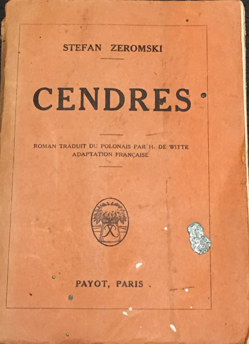 Stefan Żeromski, Cendres - couverture de l'édition de 1930